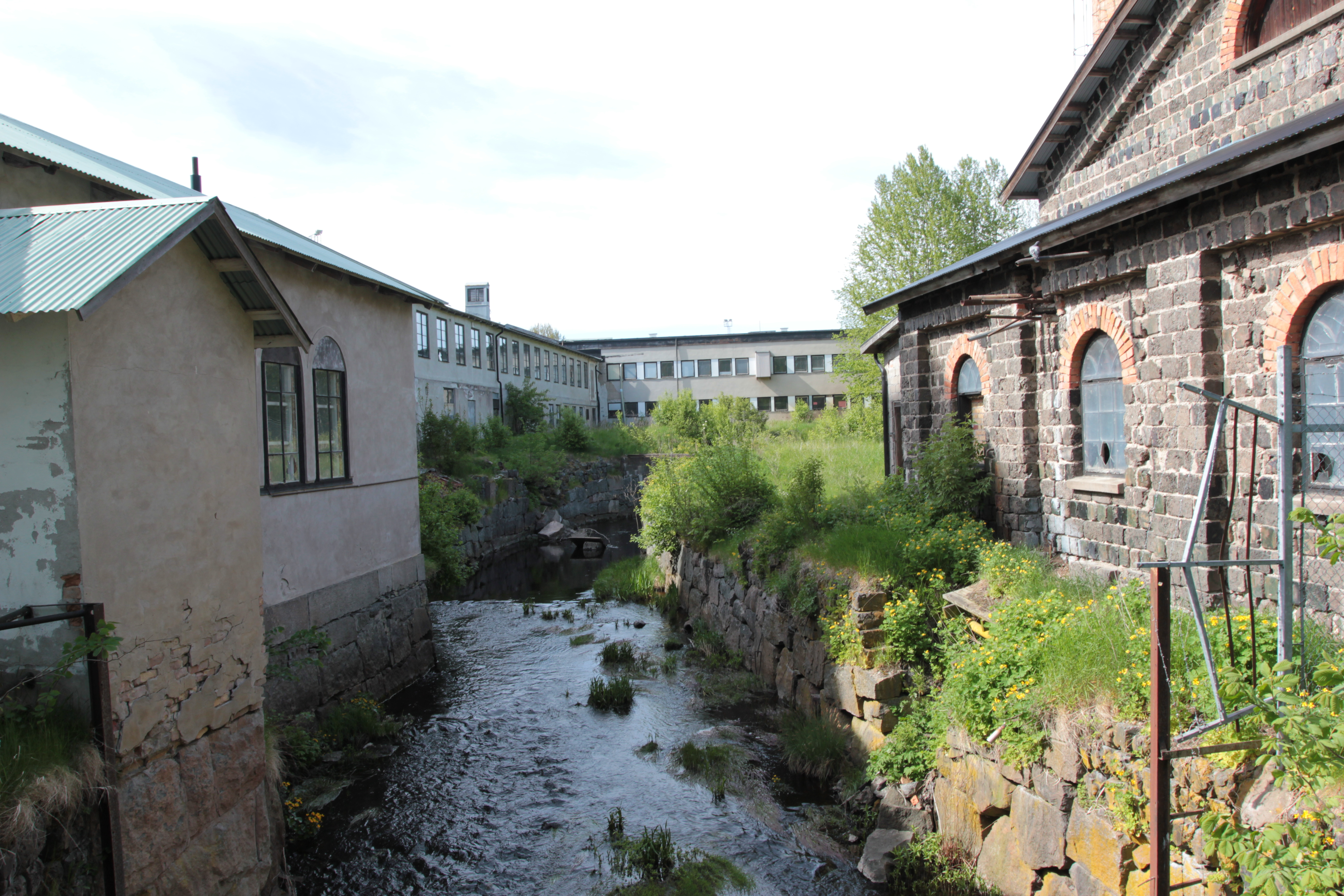 Området vid gamla järnbruket och Monarkfabriken i Tobo. Foto uppladdat som en del i Bergslagssafarin 26 maj 2012.